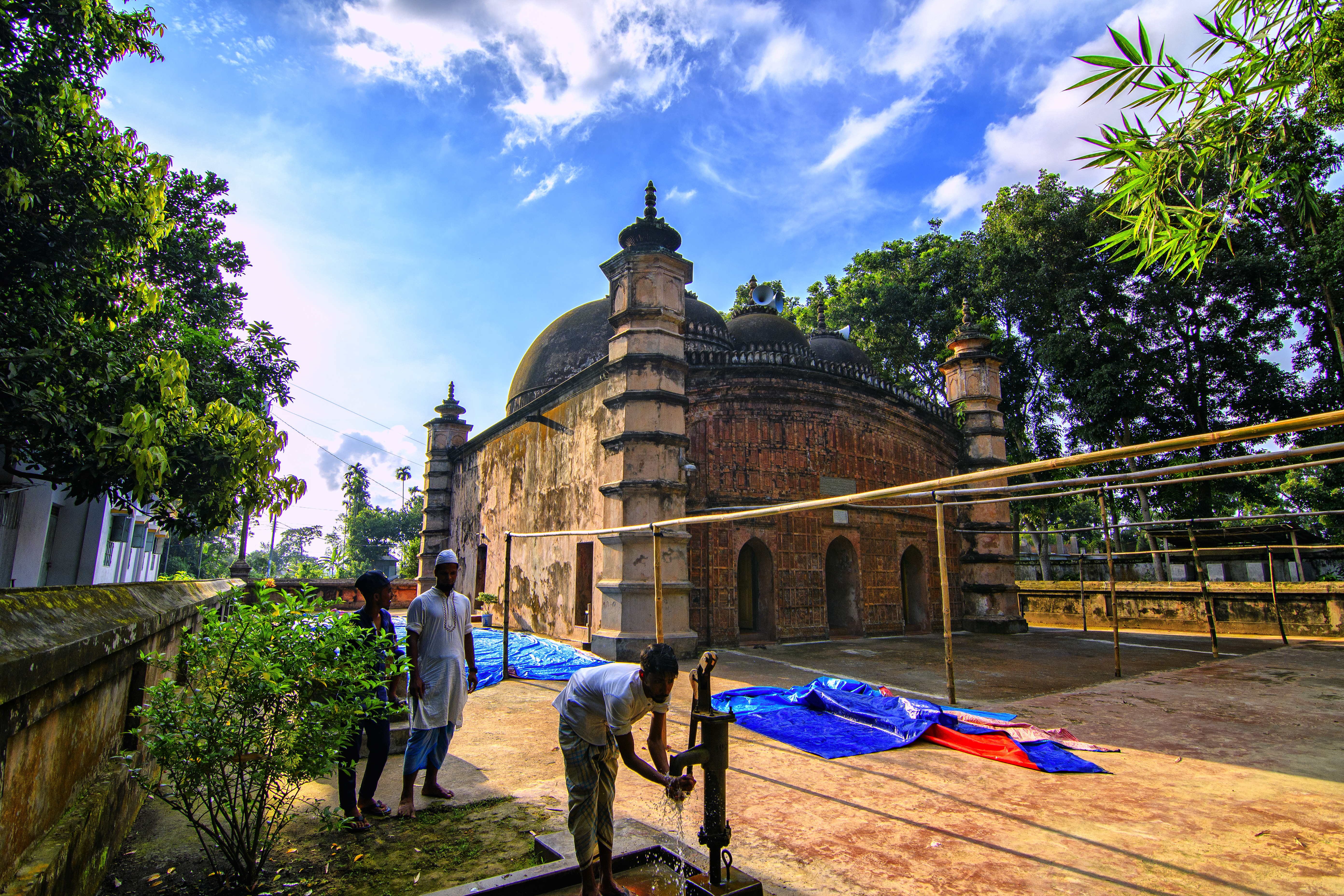 আতিয়া মসজিদ